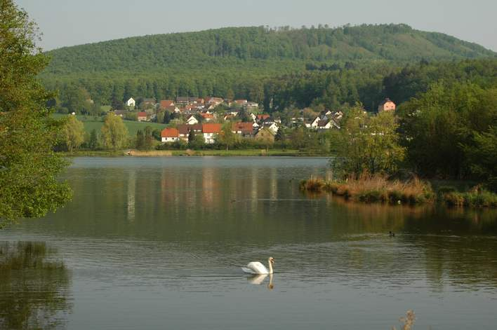 Morgenstille am Schiedersee (Emmerstausee) mit Blick auf Glashütte